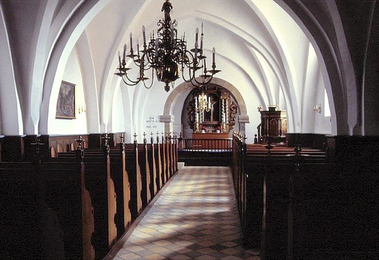 Borup Kirke i Danmark. Skibet set mod øst